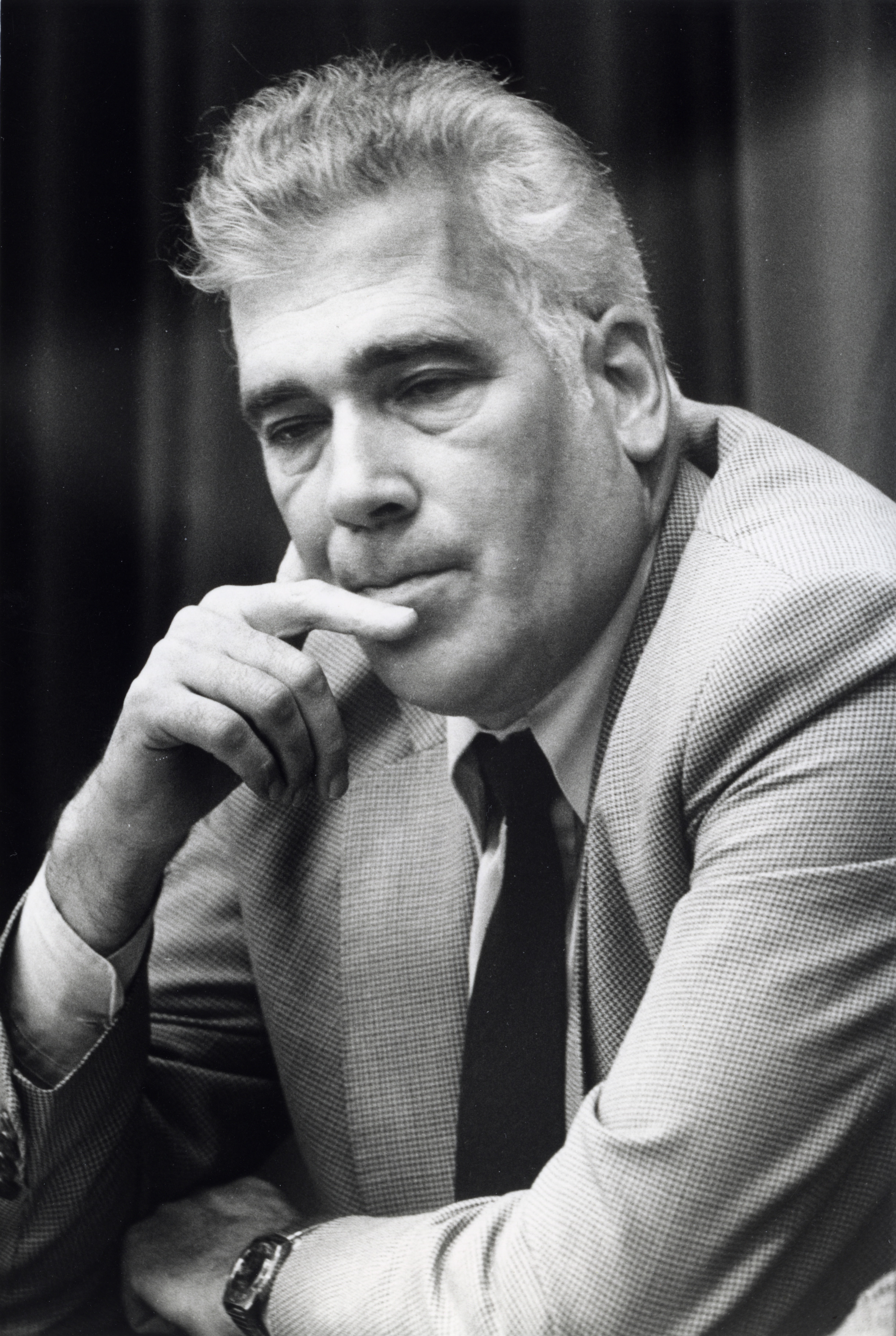 PvdA-Tweede Kamerlid Piet de Visser, 12 november 1985.